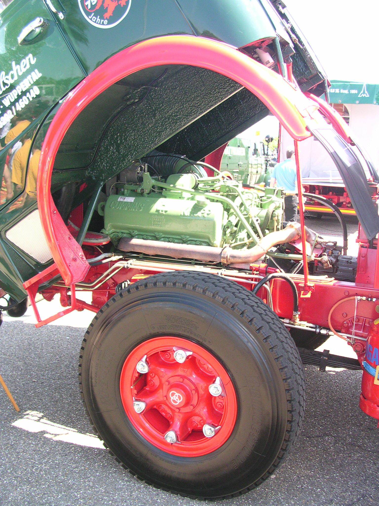 Krupp Frontlenker (Fernverkehrs-LKW, nähere Angaben unbekannt) in Wörth am Rhein beim Oldtimer-Treffen bei Daimler-Chrysler